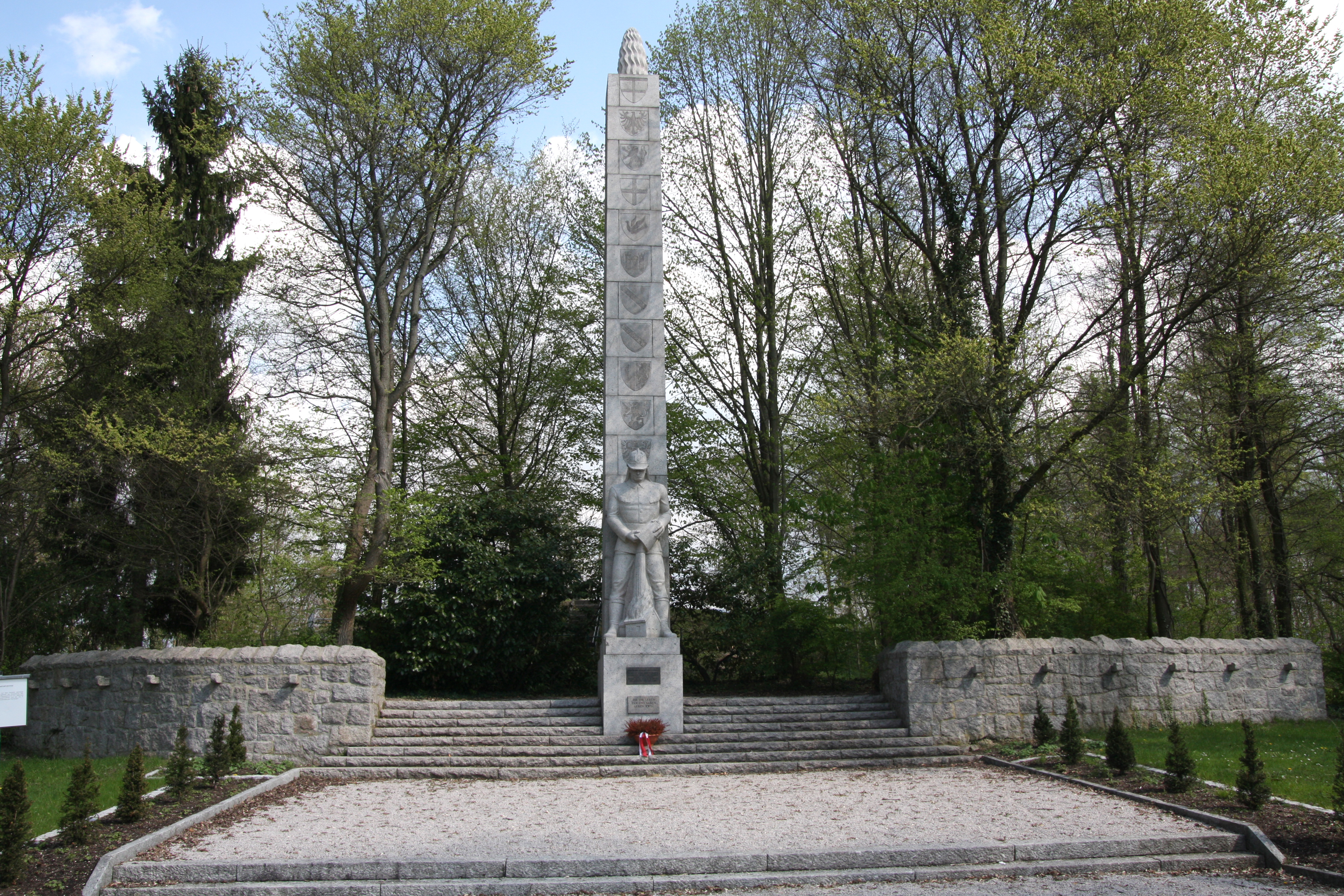 Landes-Feuerwehr-Ehrenmal Baden-Württemberg in Achern (Deutschland, Ortenaukreis), 1936 erbaut. Das Denkmal steht zu Ehren der Feuerwehrleute Baden-Württembergs, die ihr Leben im Dienst für den Nächsten verloren haben. Es wurde vom Karlsruher Bildhauer Karl Dietrich nach einem Entwurf des Architekten Franz Kuhn aus Heidelberg gefertigt.